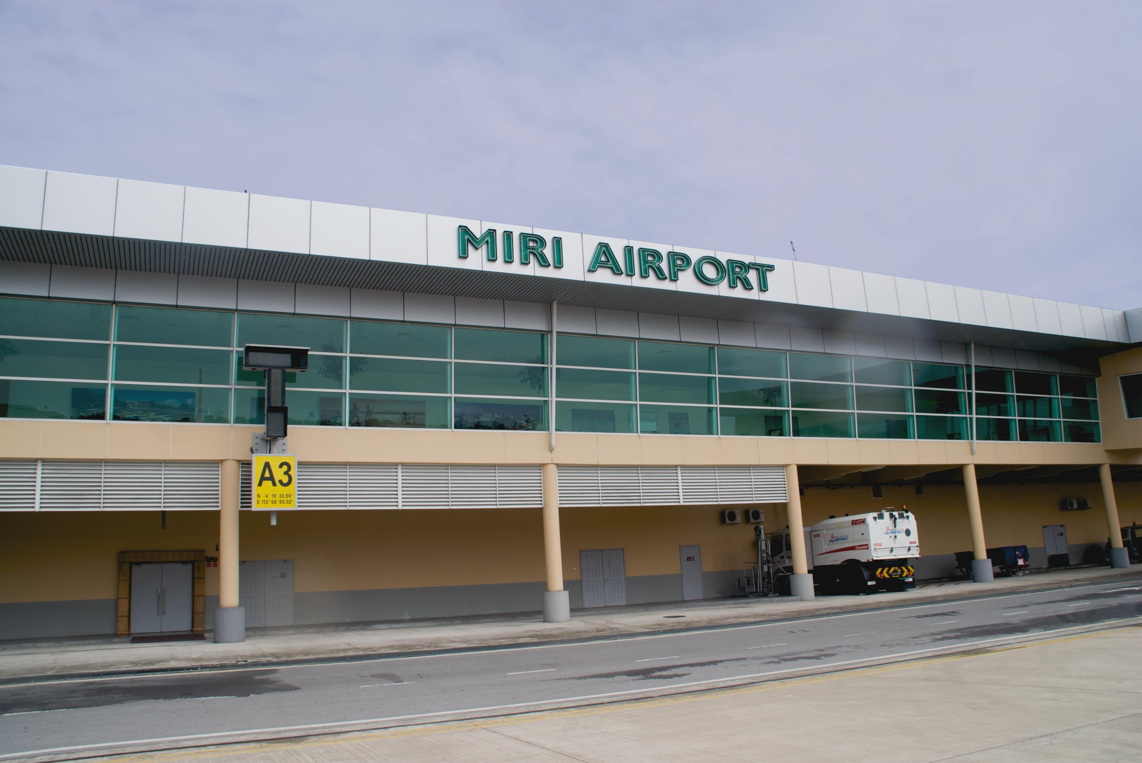 Terminalgebäude des Flughafens Miri